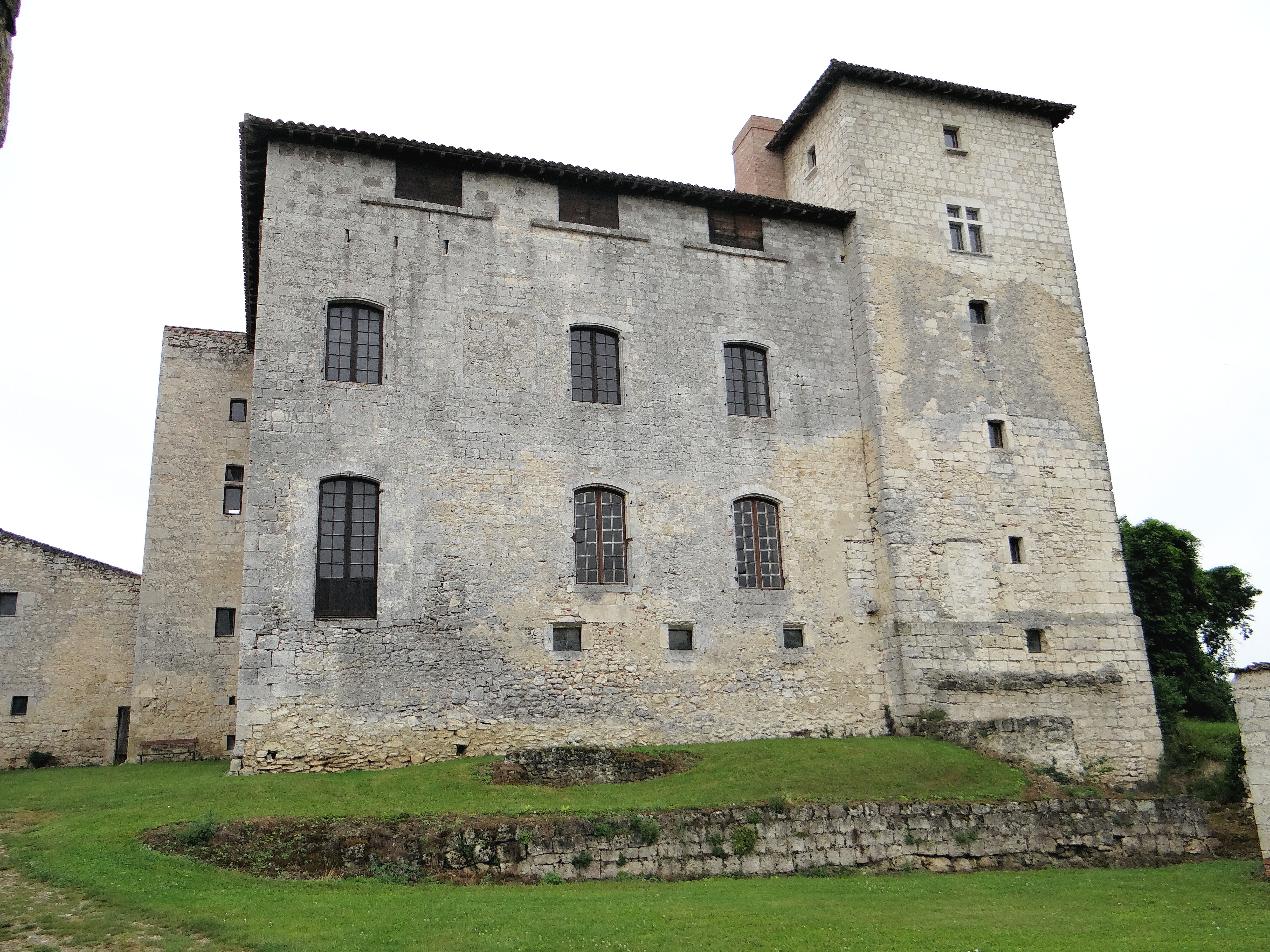 Château d'Avezan